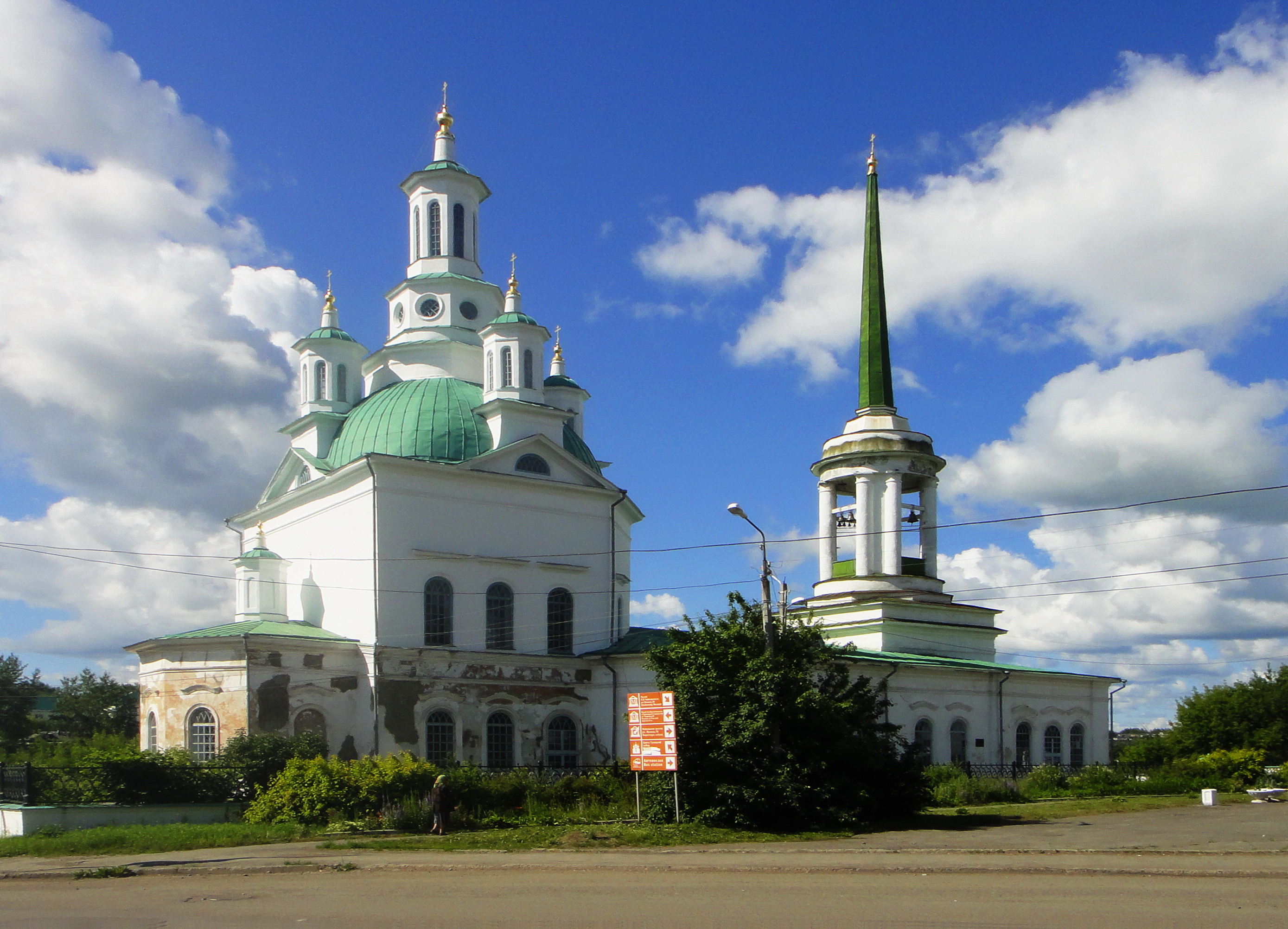 Алексеевская церковь (Свято-Троицкий собор) (Свердловская область, Алапаевск, улица Чайковского, 19)